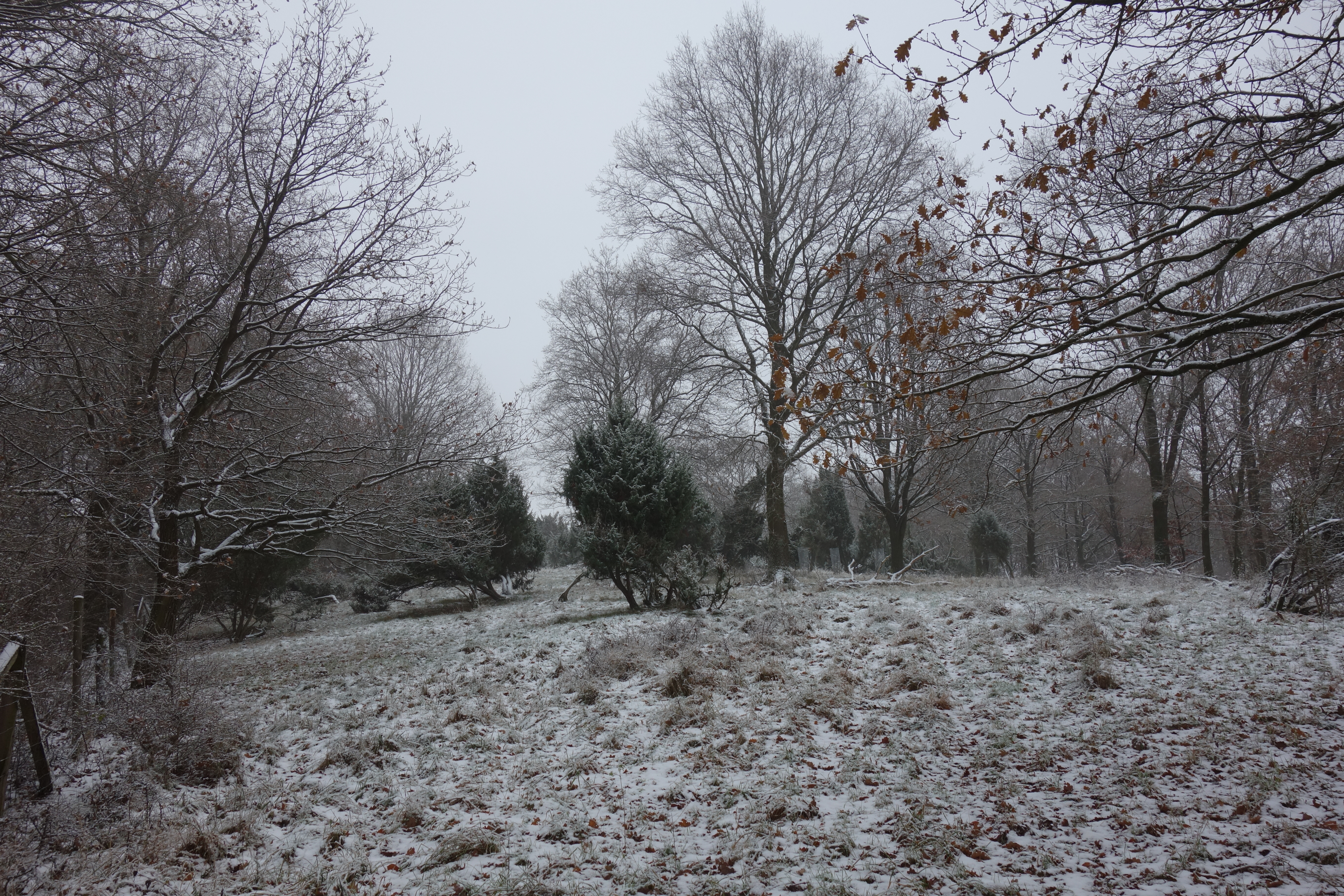 Naturschutzgebiet Hölzchen von Süden mit Wachholdern.